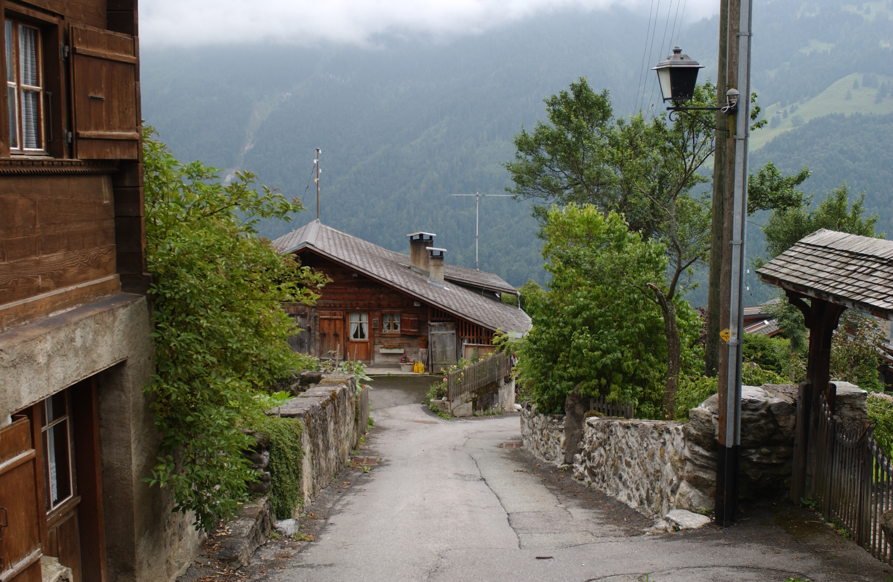 Vue de Gryon (Vaud).